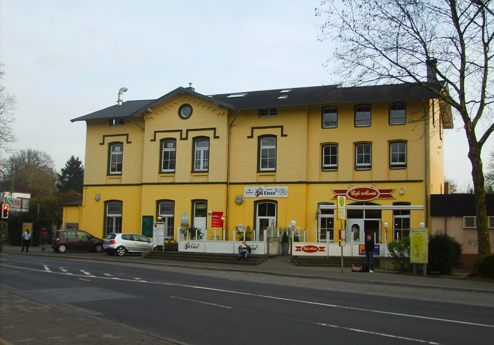 Bahnhof Gruiten, Haan, NRW, Germany